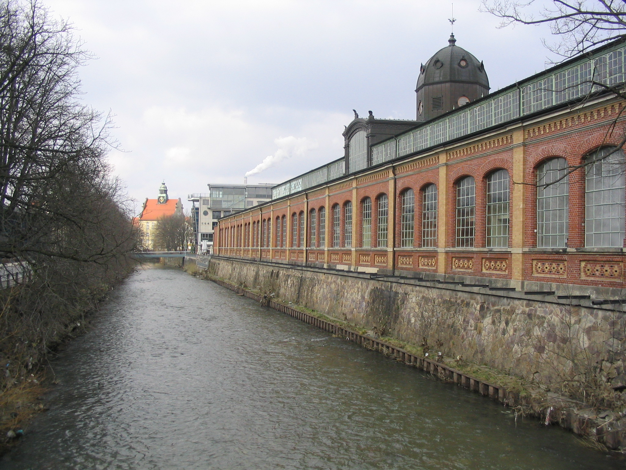 Ansicht der Chemnitzer Markthalle, Augenommen am 11.04.2006 von Dr. Hagen Graebner